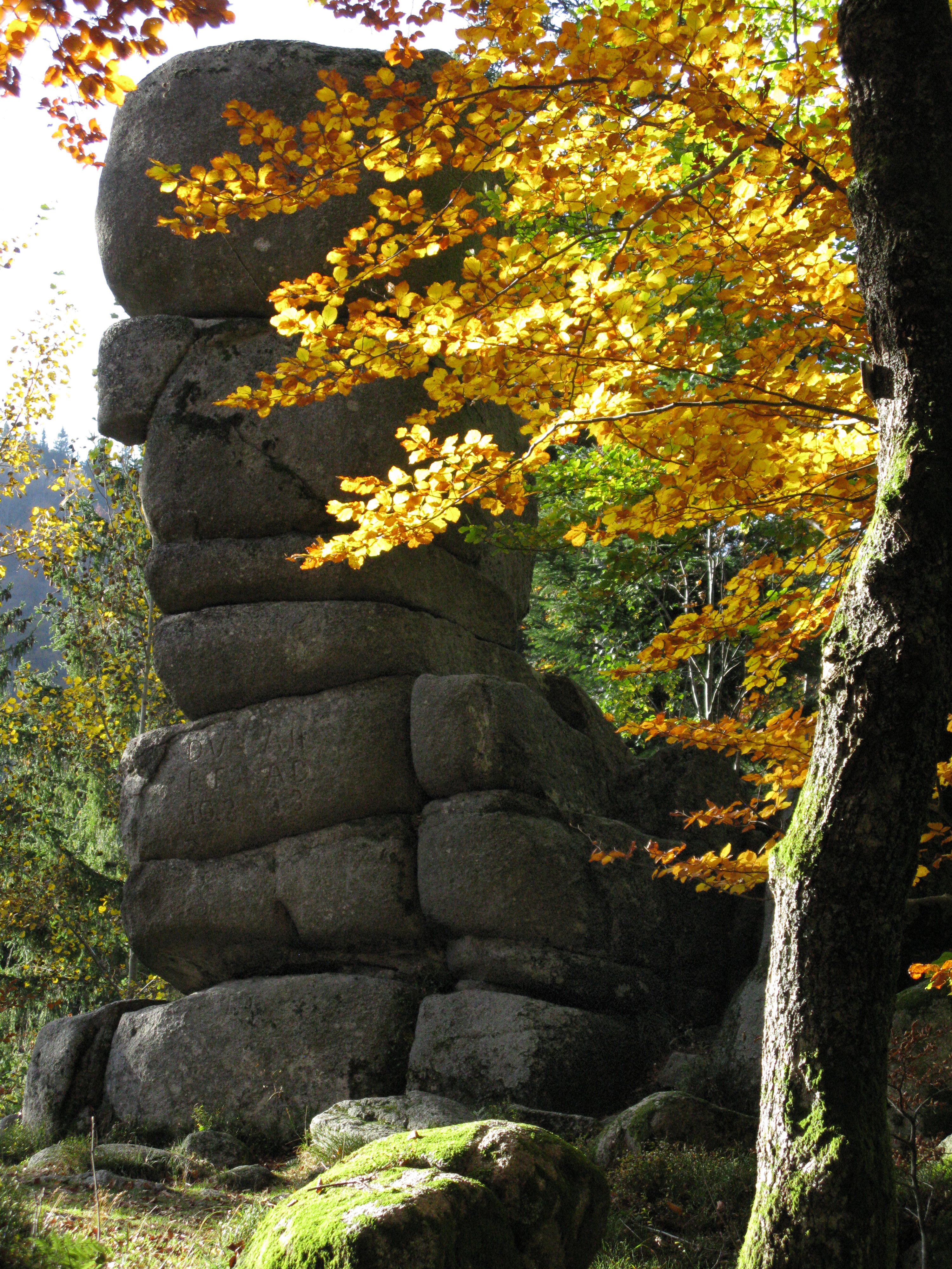 Der Siebenfelsen bei Elzach-Yach im Naturschutzgebiet „Yacher Zinken“